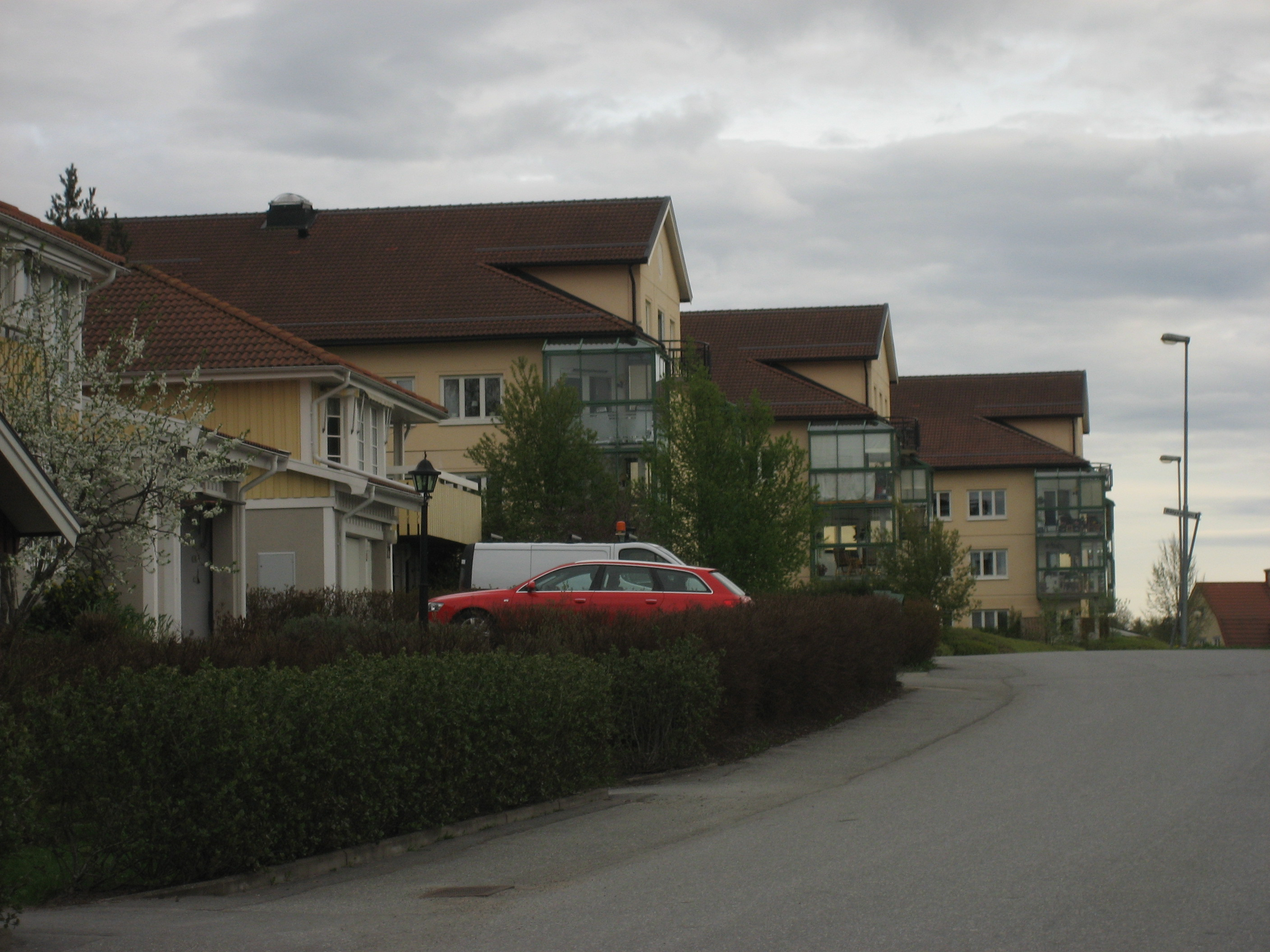 Ånstabacken in Örebro, Sweden